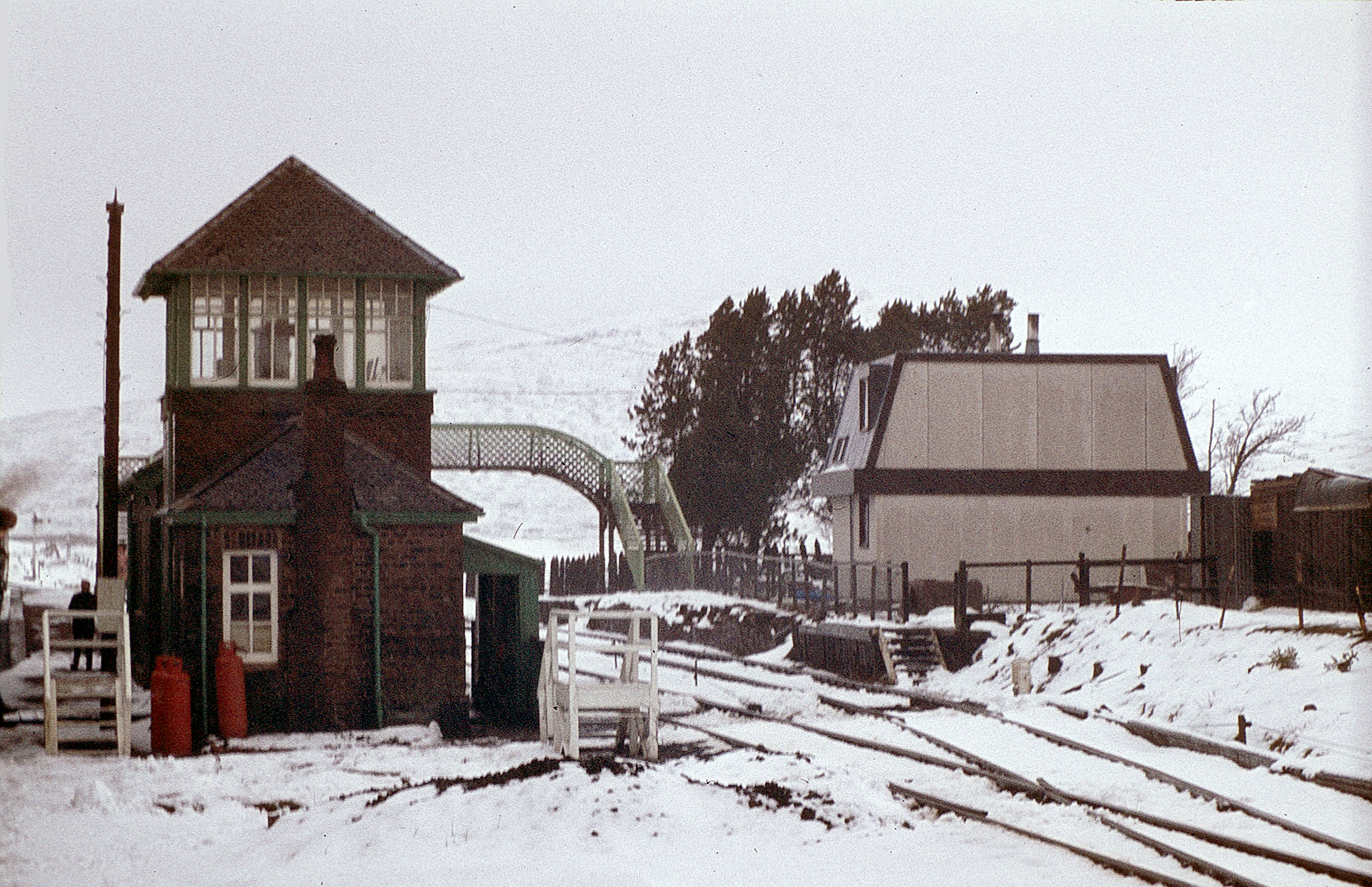 March 1982